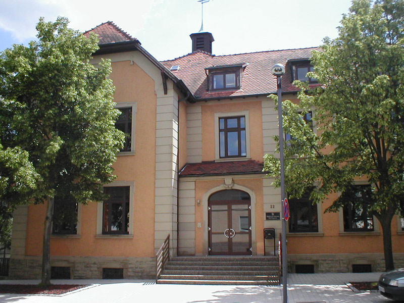 Schulhaus von 1906 in Bad Rappenau